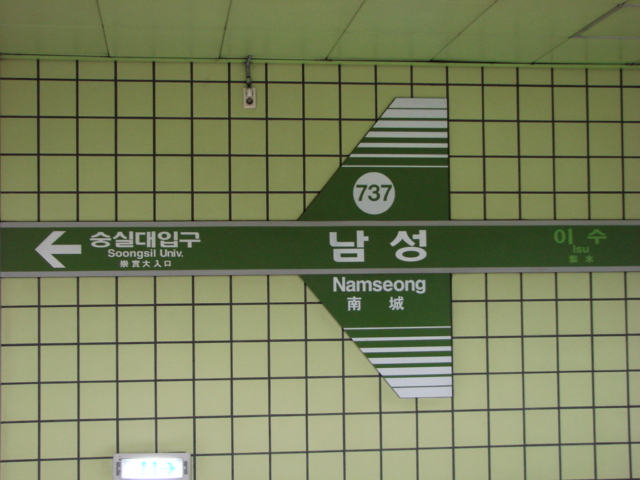 ソウル地下鉄7号線南城駅 駅名標